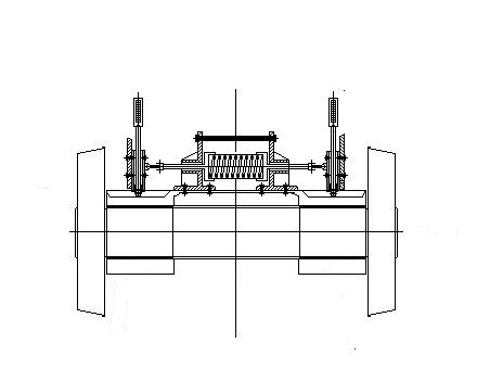 Az Adams–Webb-rendszerű beállótengely visszatérítő szerkezete